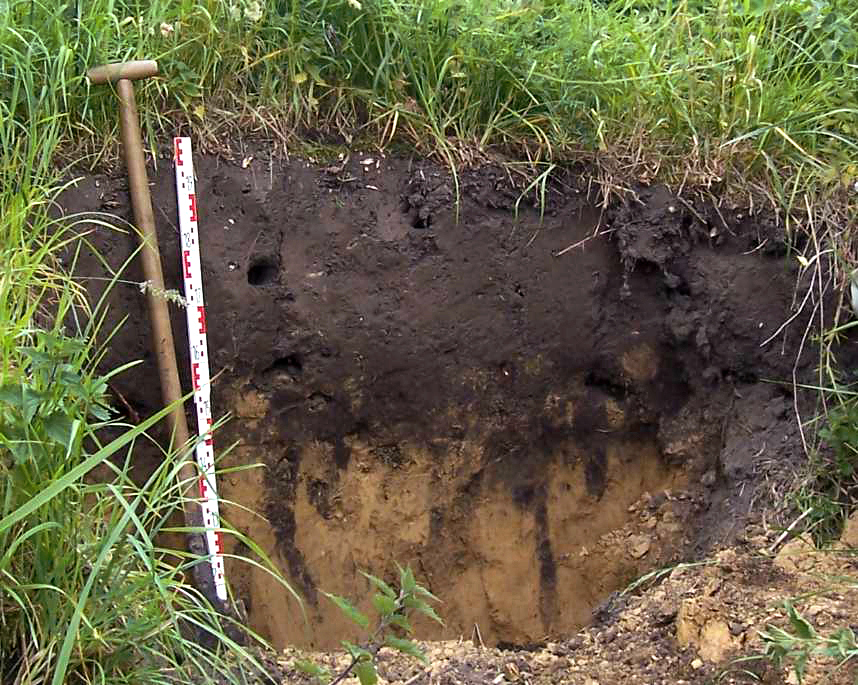 Schwarzerdeprofil Asel an einem Aufschluss nahe der früheren Tongrube